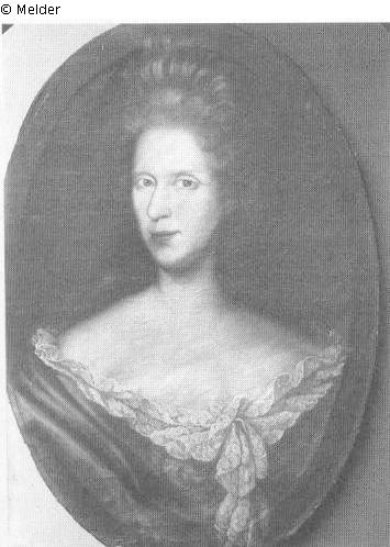 Bildnis Christine Margarete von Mecklenburg-Güstrow, Herzogin von Mecklenburg-Schwerin